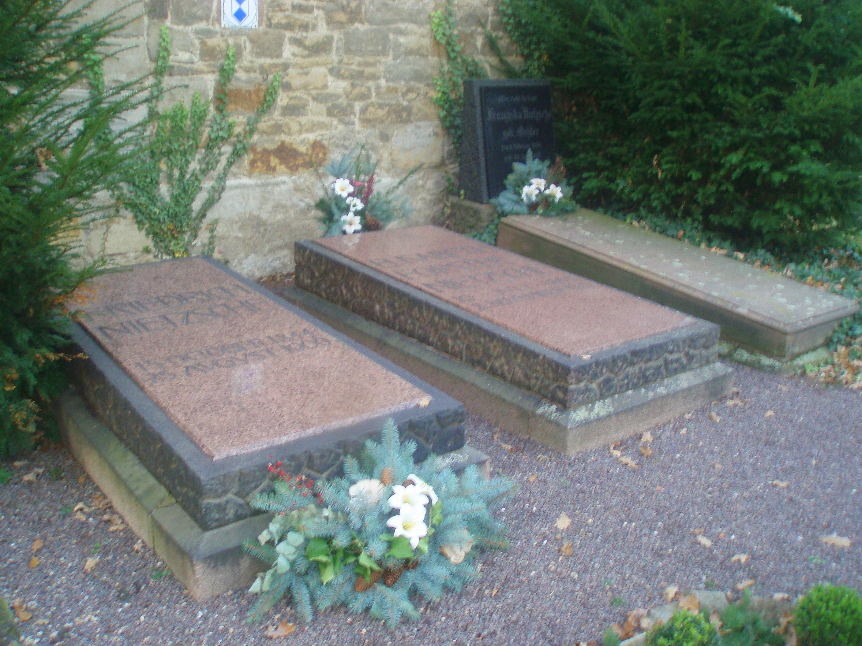 Grabstätte des Philosophen Friedrich Nietzsche und seiner Familie in Röcken